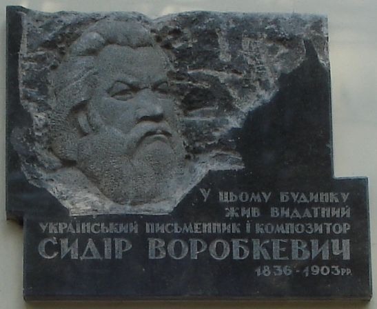 Меморіальна дошка письменнику і громадському діячу Сидору Воробкевичу на будинку, де він жив